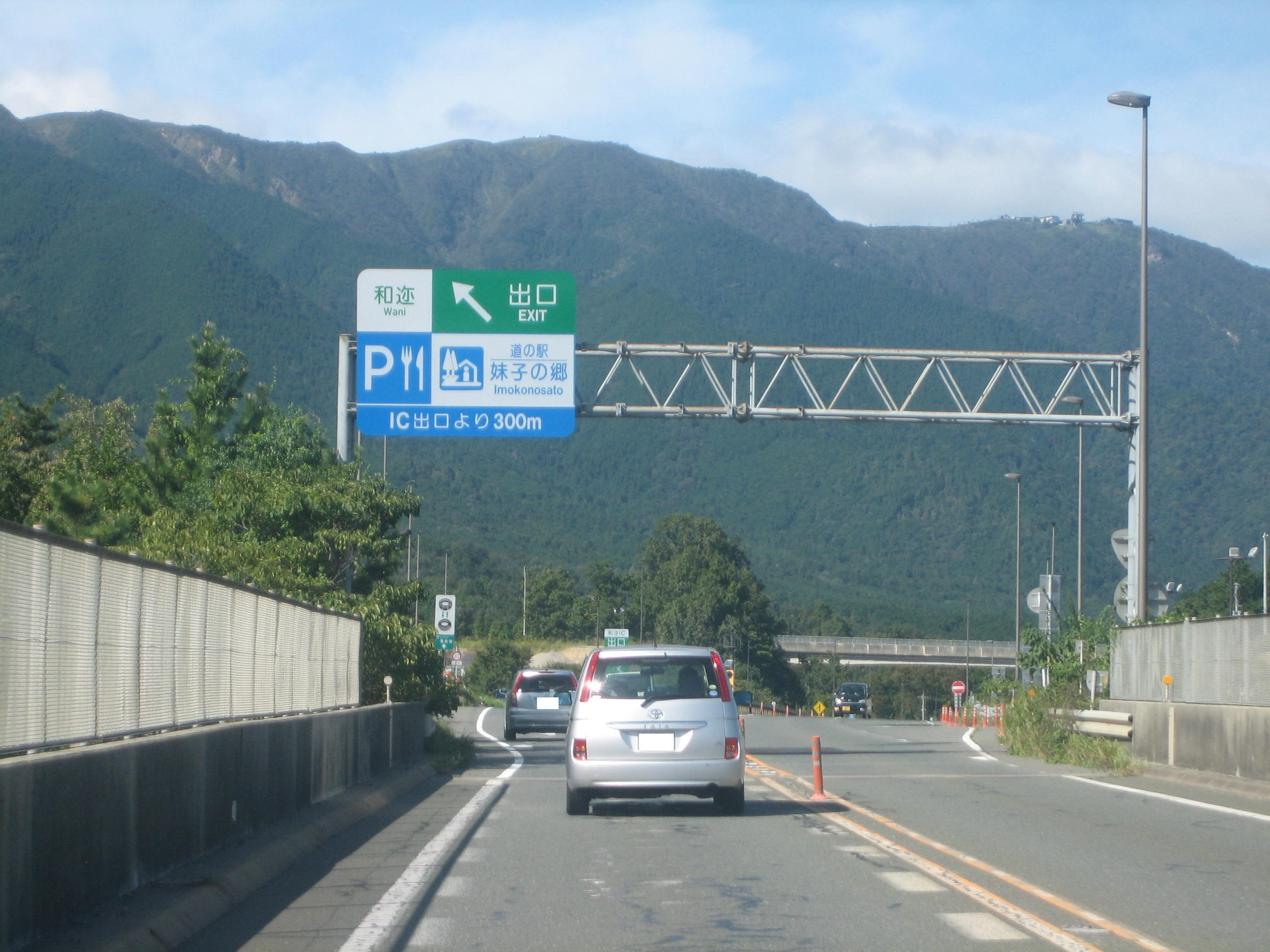 和迩IC出口